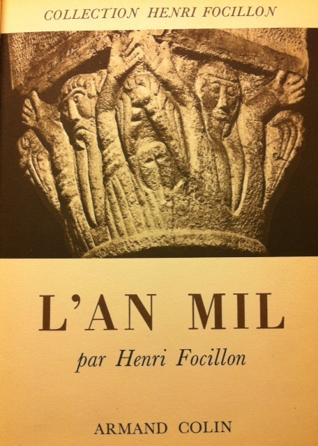 Henri Focillon, "L'an mil", Paris : A. Colin, 1952